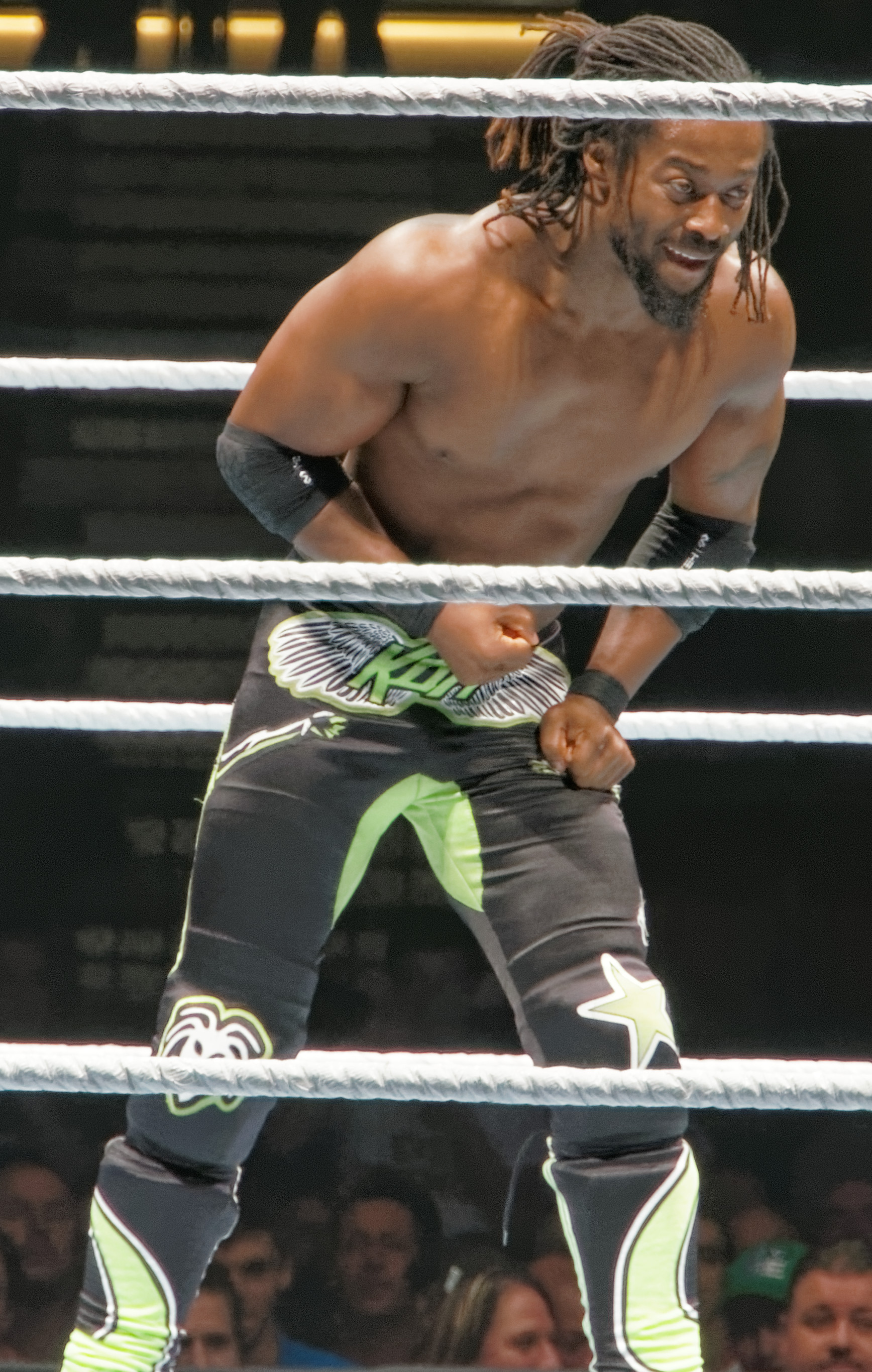 2013-11-08_20-47-00_NEX-6_7889_DxO